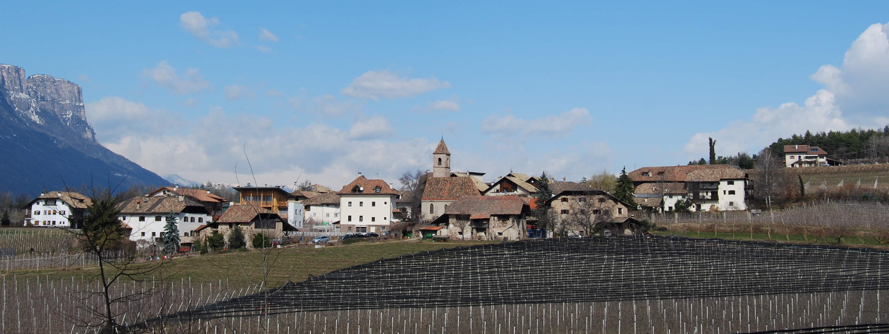 Montiggl, Ortsteil von Eppan in Südtirol